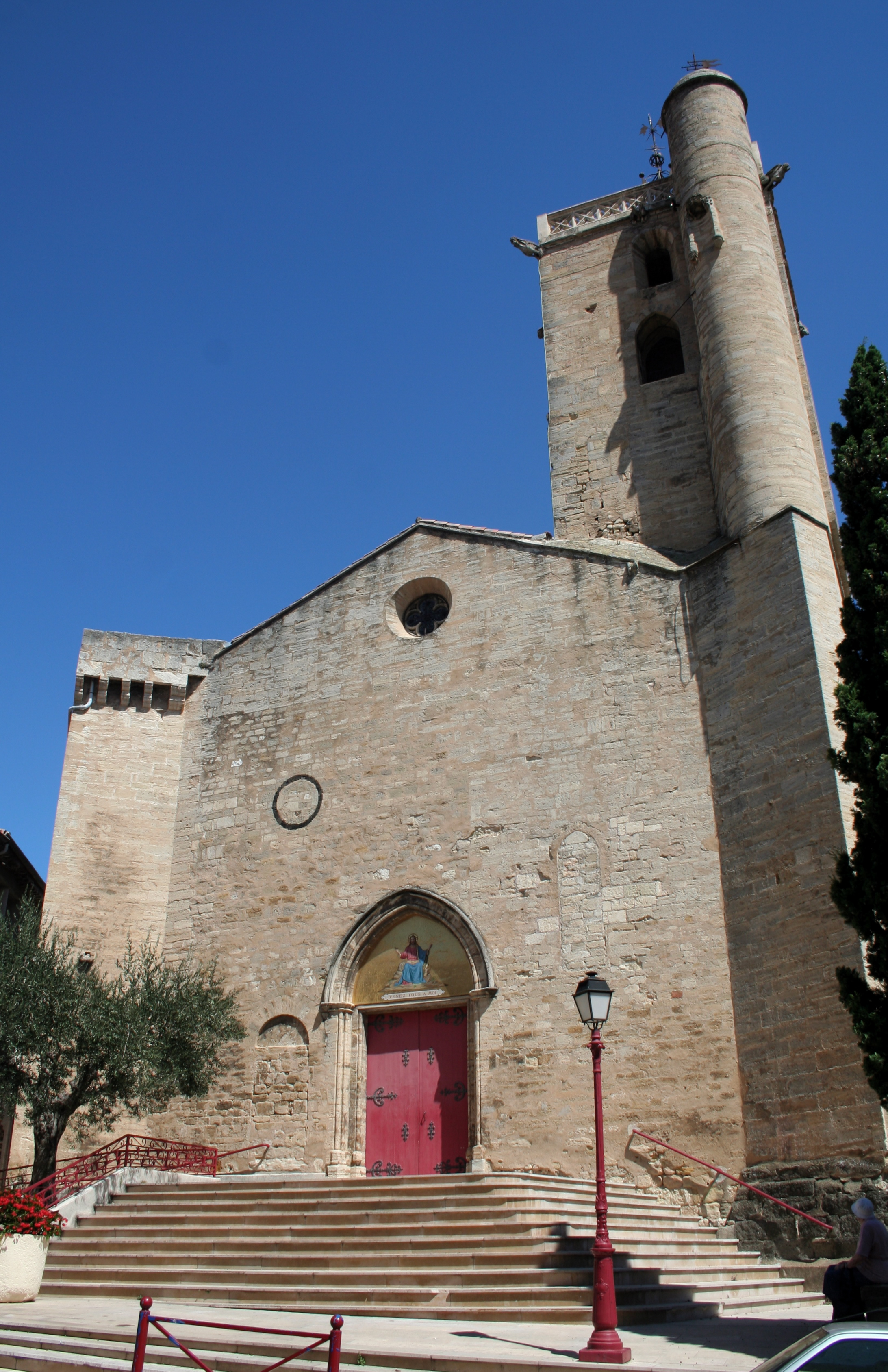 Servian (Hérault) - façade de l'église paroissiale Saint-Julien et Sainte-Basilisse.